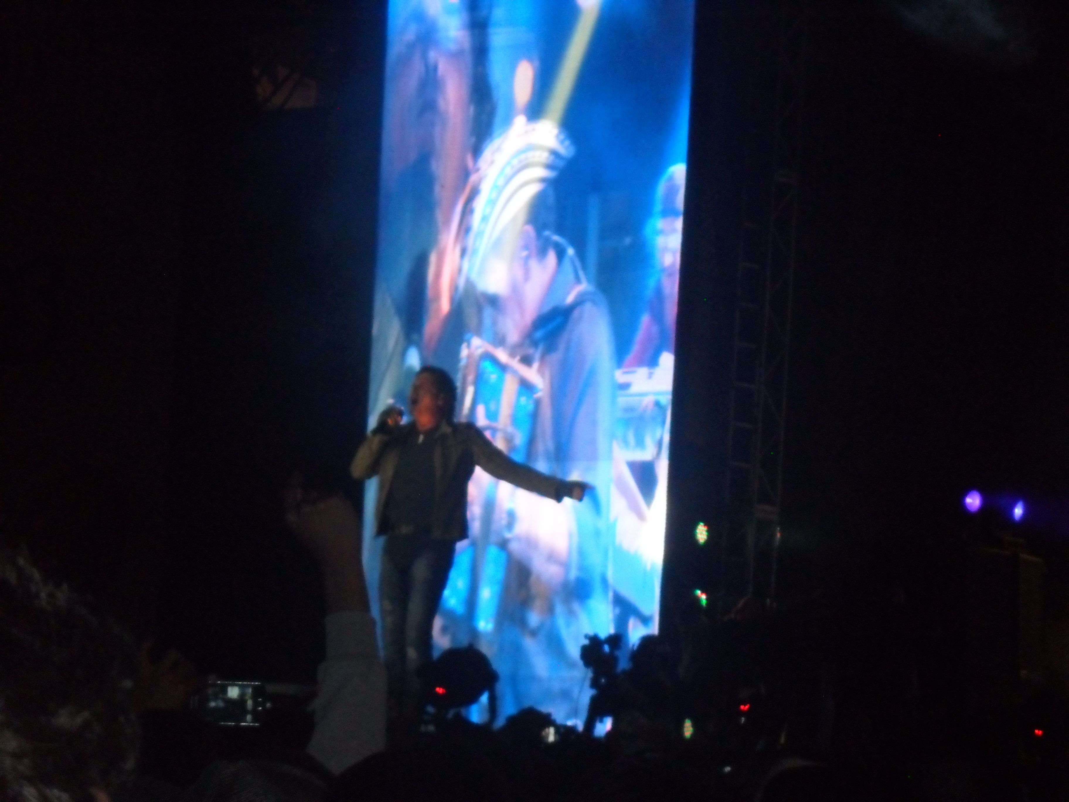 Vives en vivo